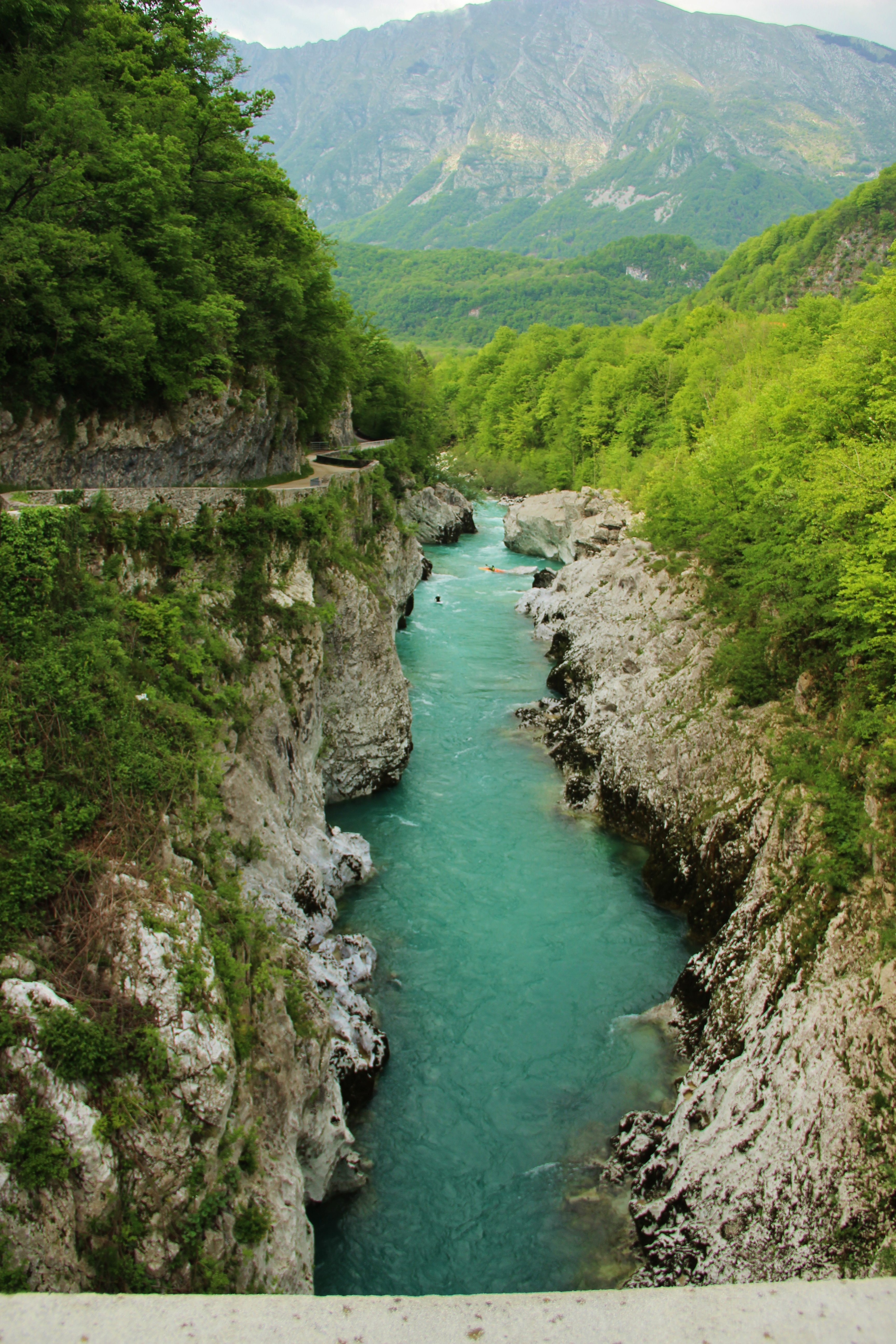 Isonzo-Fluss. Aufgenommen von der Napoleonbrücke